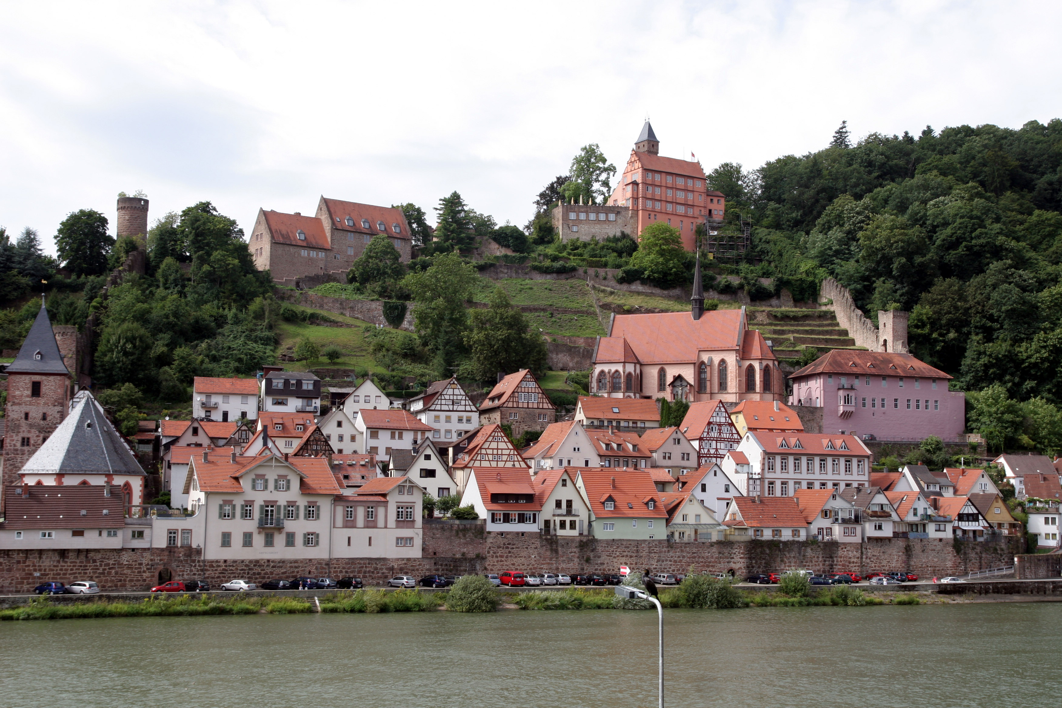 Hirschorn am Neckar.